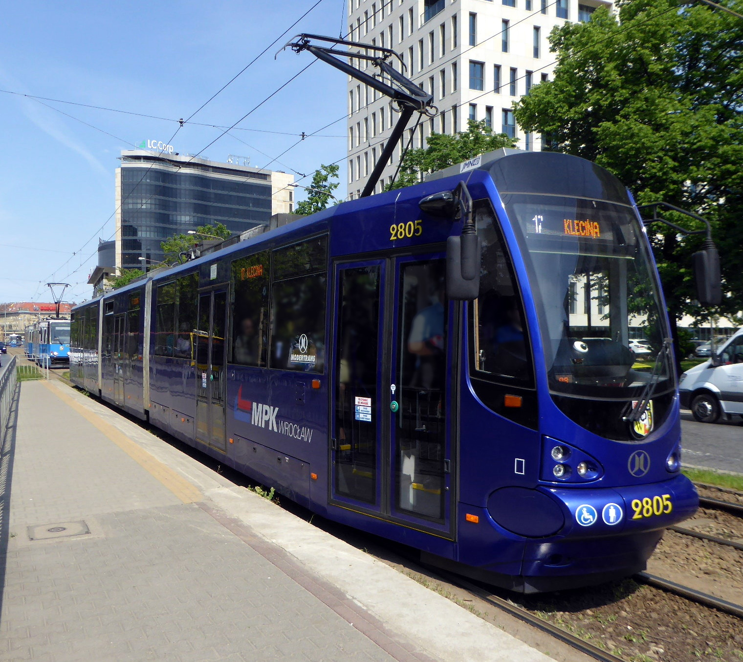 Breslau, Straßenbahn an der Straße Powstańców Śląskich.